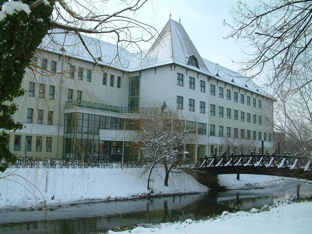 Erkel Ferenc Gimnázium épülete télen, Gyula